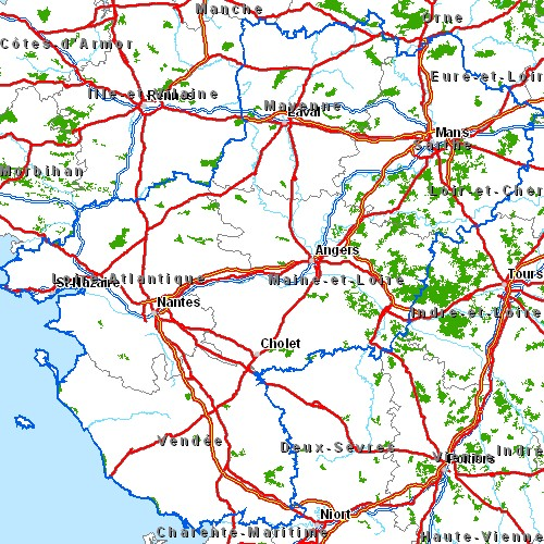 Carte routière de la région Pays de la Loire Légende